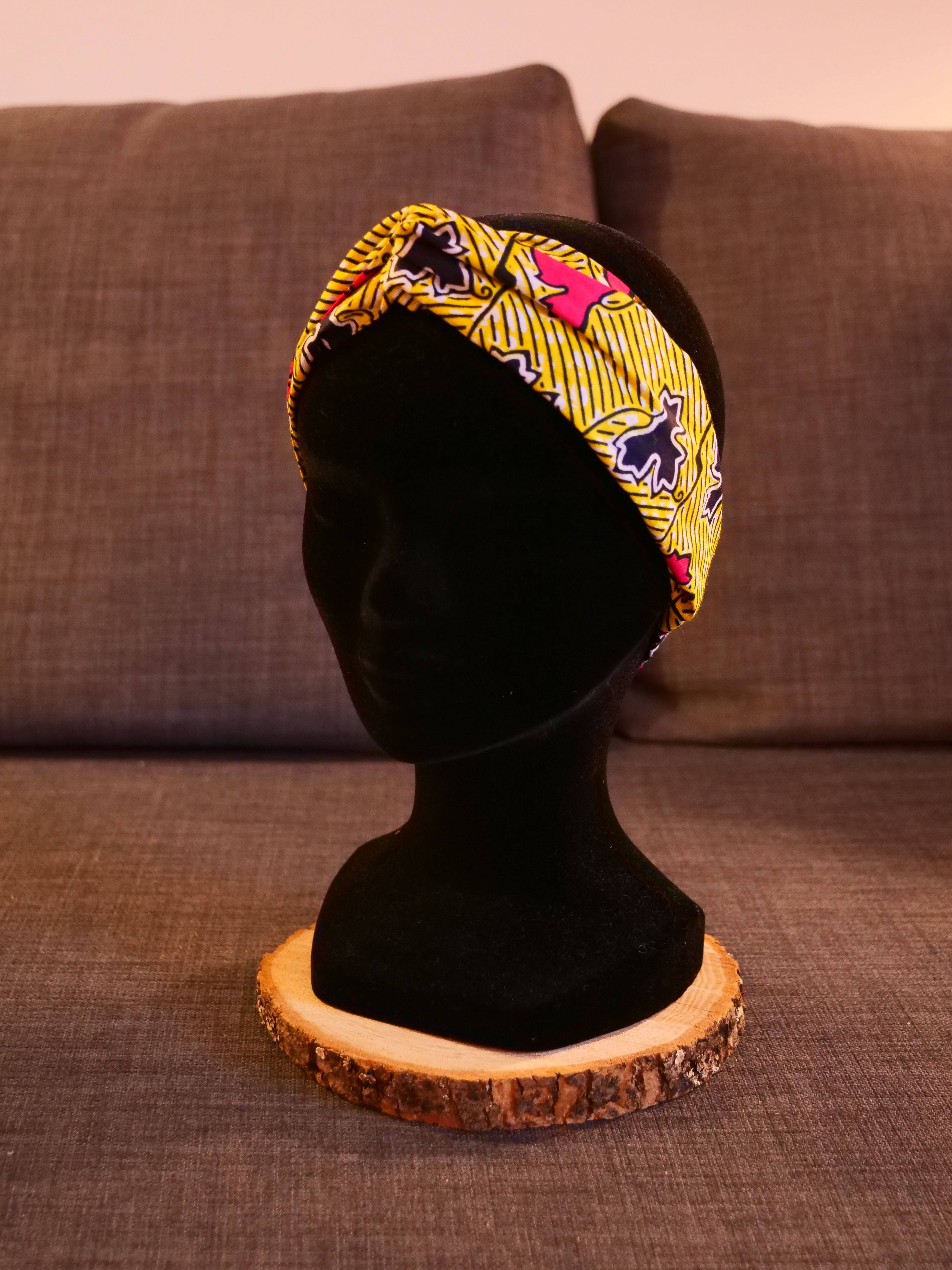 Headband fait en wax par la créatrice française Home Mad Wax